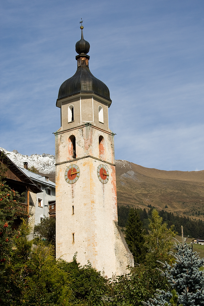 Kirchturm der ehemaligen Kirche San Jon